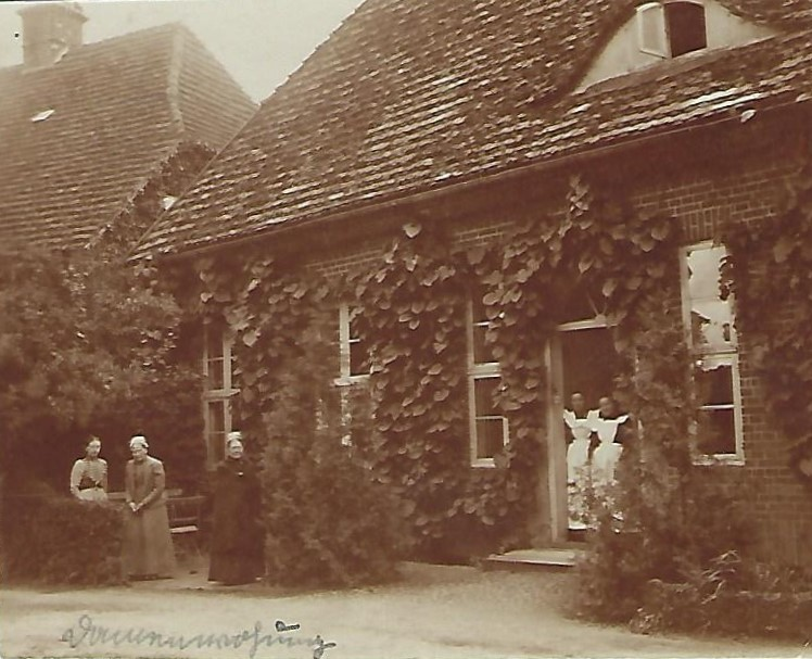 Domina Auguste von Bassewitz (3. v. li.) und Dienstmädchen vor Damenwohnung im Kloster Dobbertin